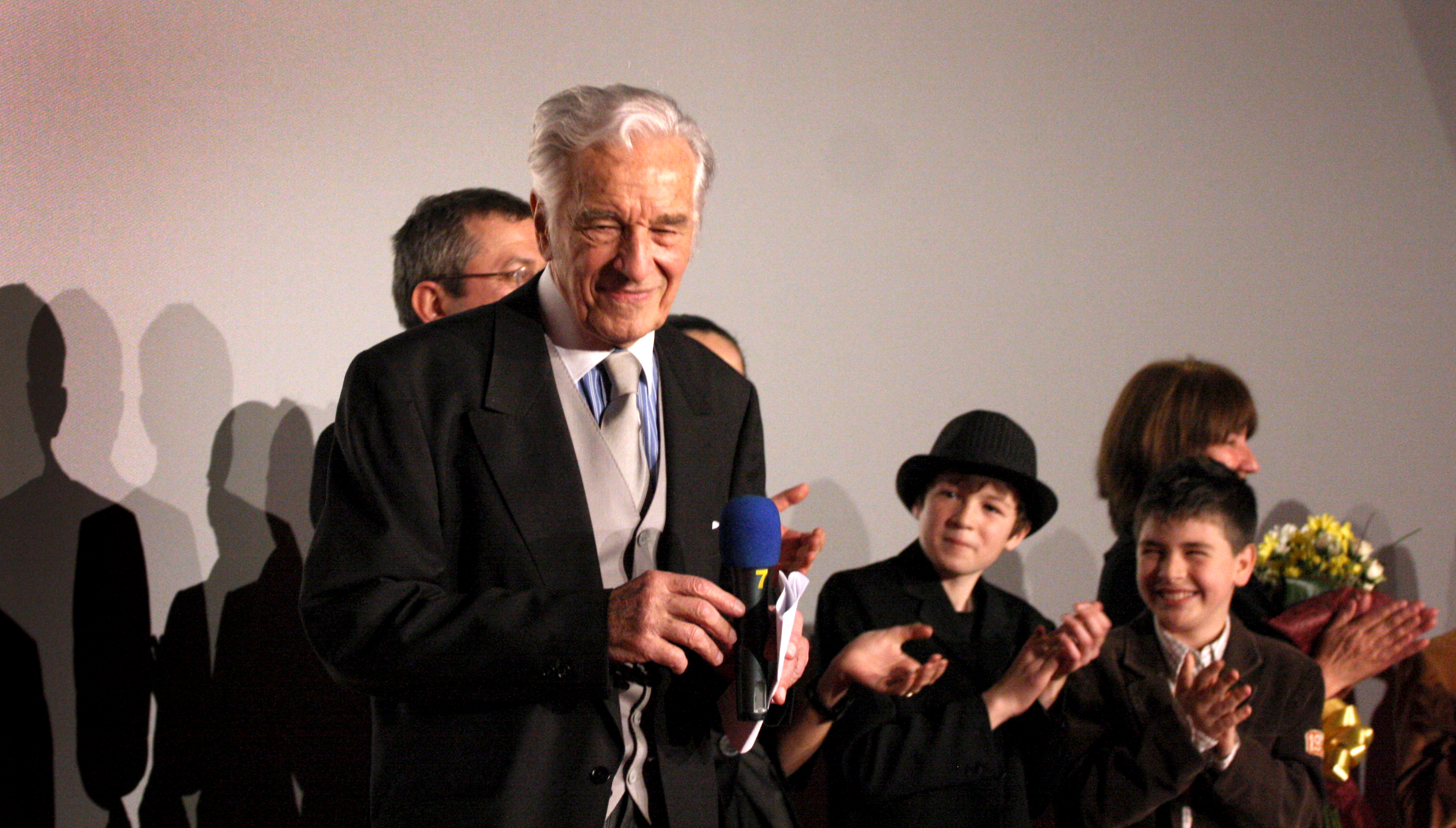 Sergiu Nicolaescu la premiera Carol I